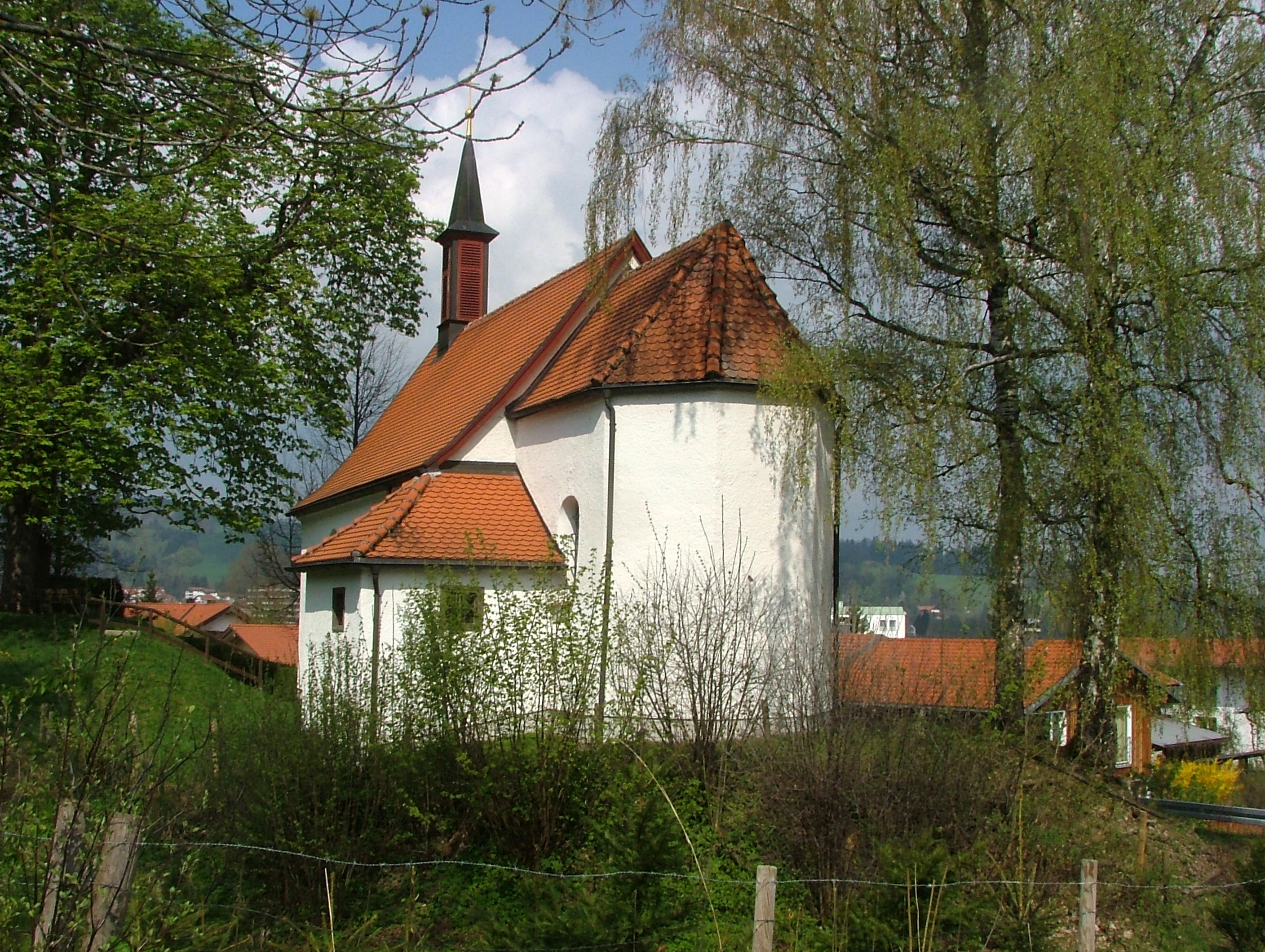 Kempten, Dreifältigkeitskapelle